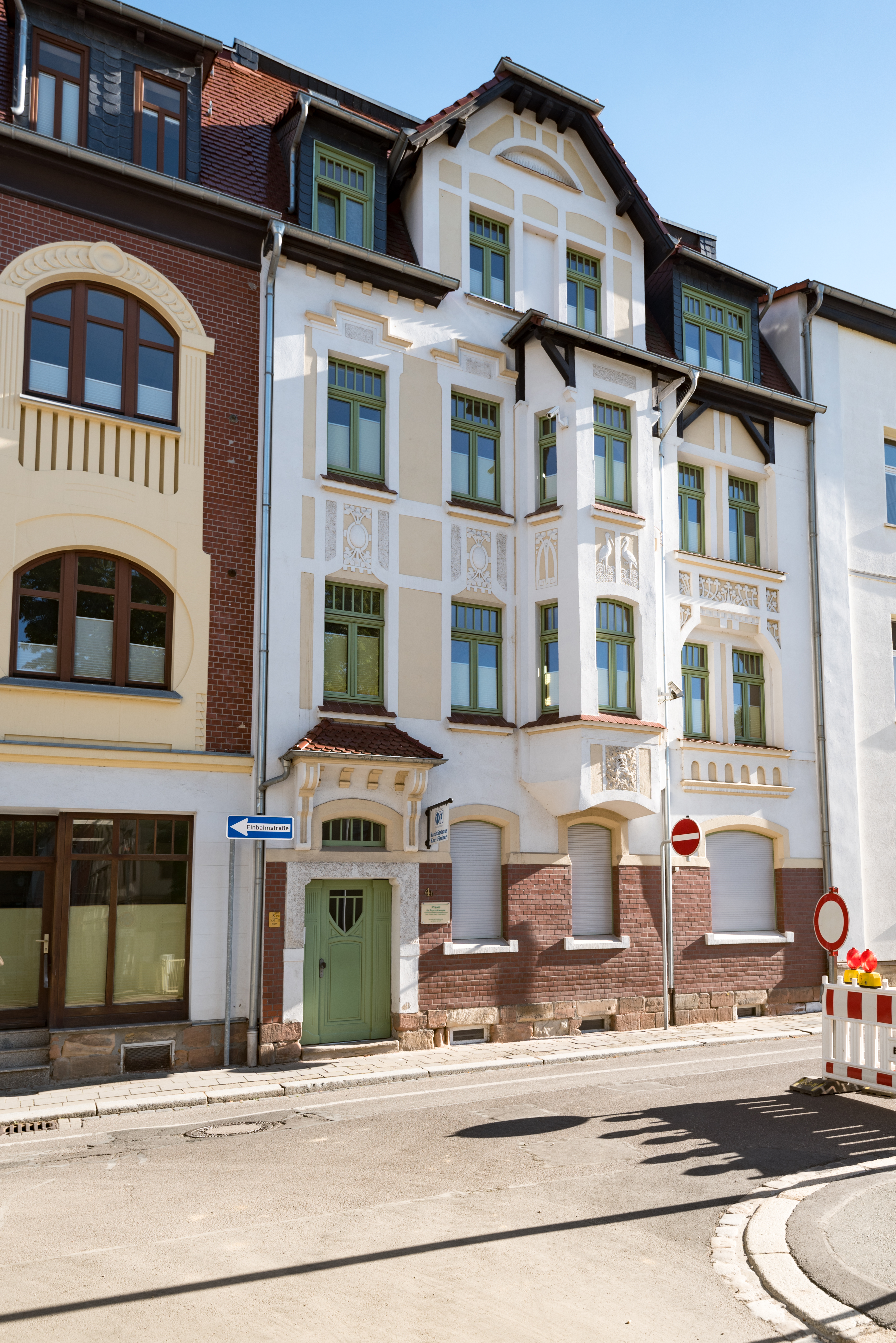 Weißenfels, Beuditzstraße 4b